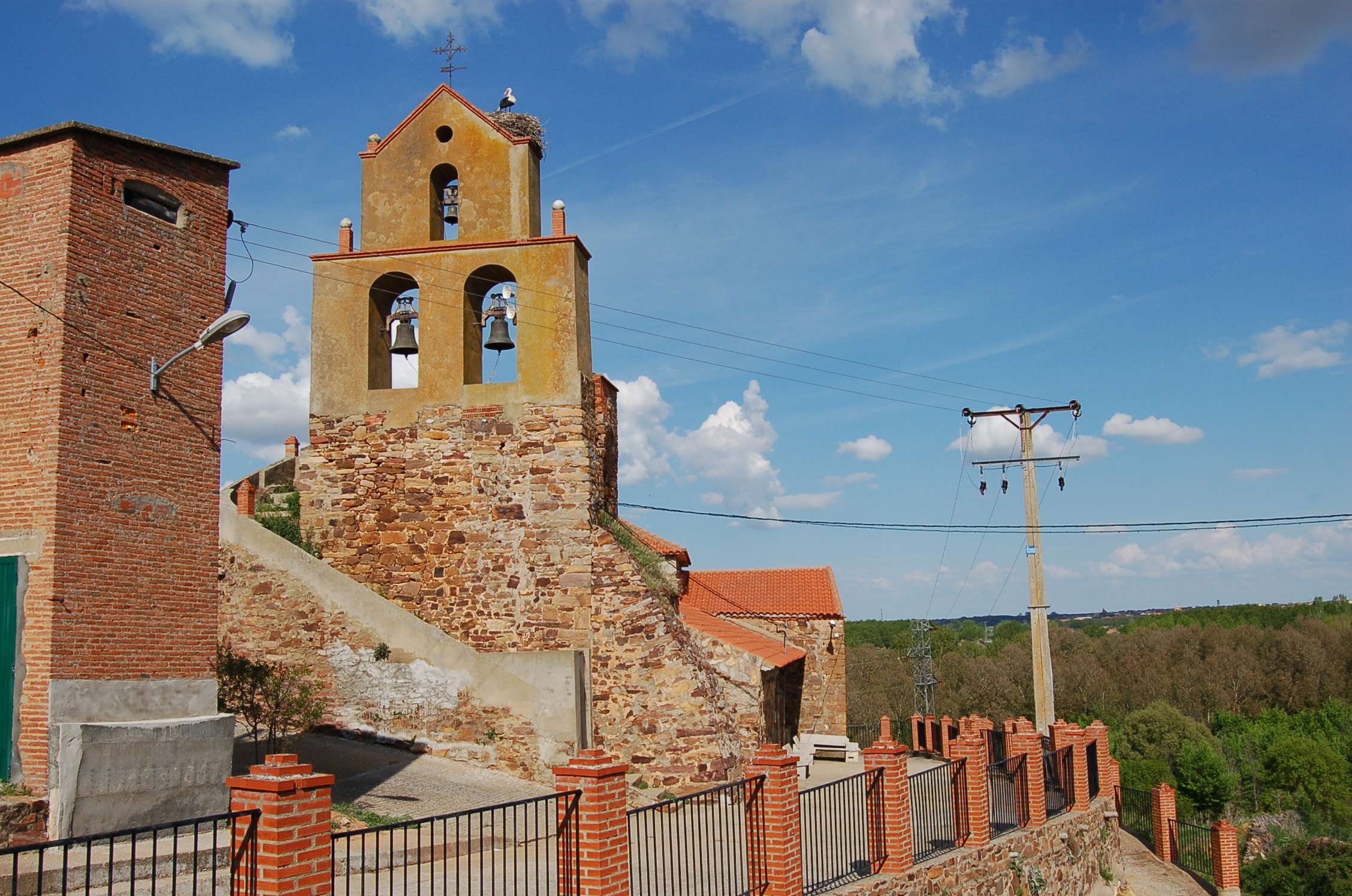 Igrexa de Bretocino